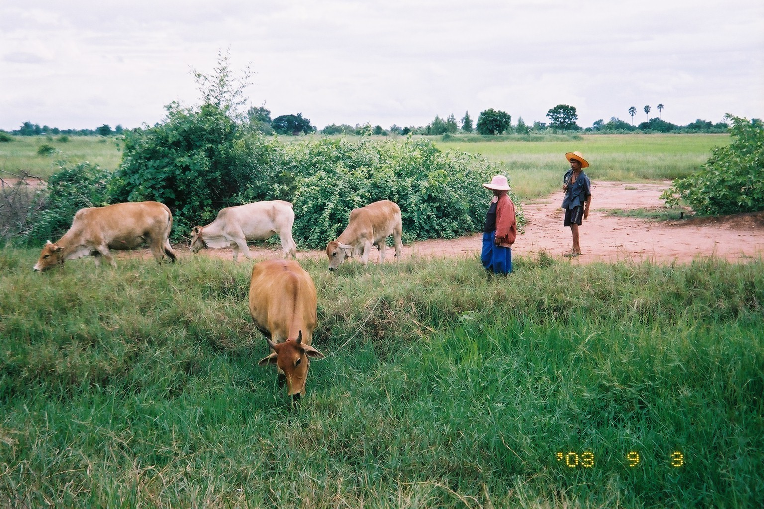 タイ東北地方の牧畜。牛番(牛追い)は，道路や畦道の脇に生えている草を牛に食べさせる。しかし，農地を荒らさないように，牛を見張っている。2003年9月3日撮影。